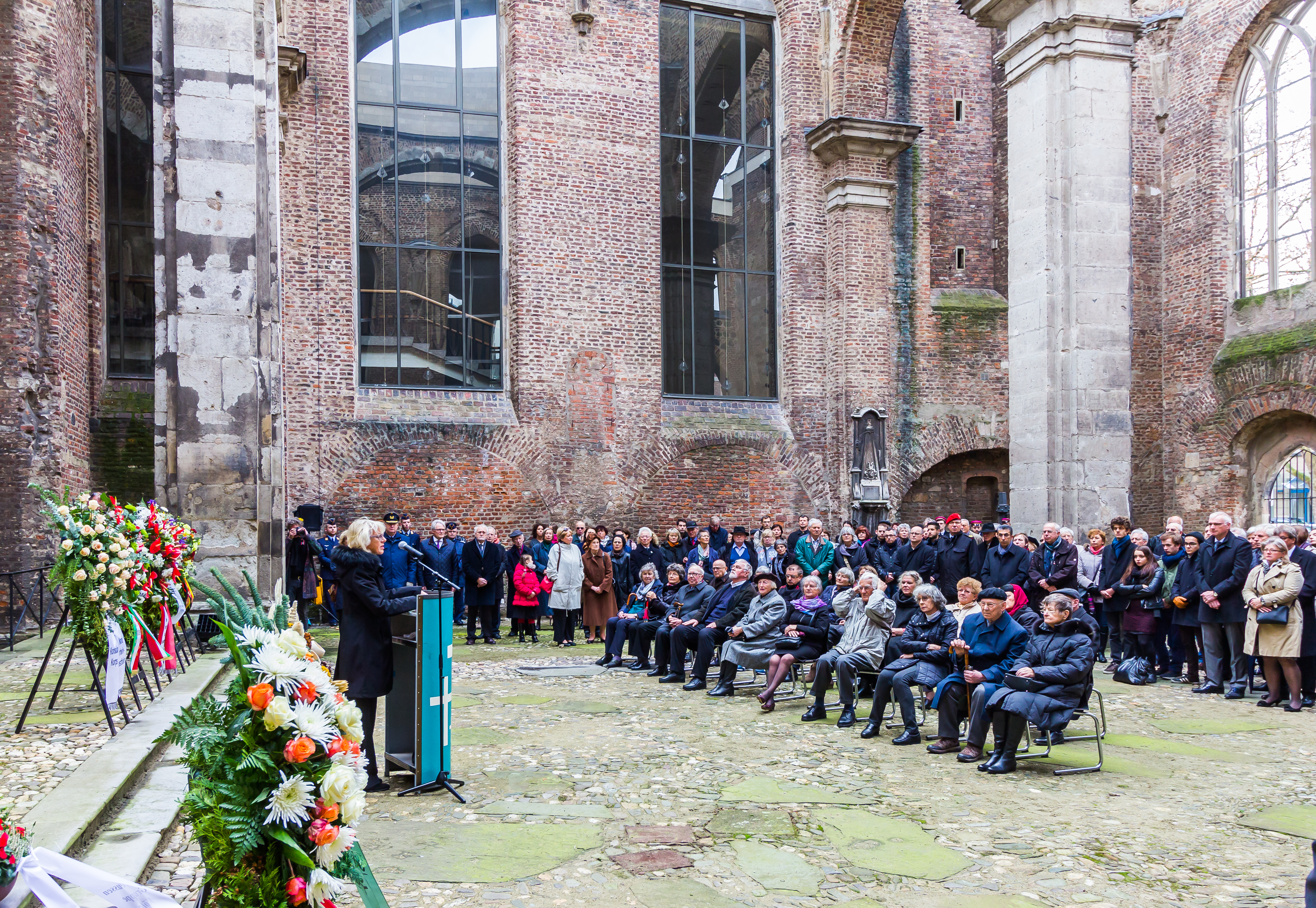 Gedenkfeier in den Ruinen von Alt St. Alban am Volkstrauertag, Köln. Es wurde ebenfalls der Opfer der blutigen Terroranschläge von Paris am 13. November 2015 gedacht. Foto: Ansprache durch Bürgermeisterin Elfi Scho-Antwerpes